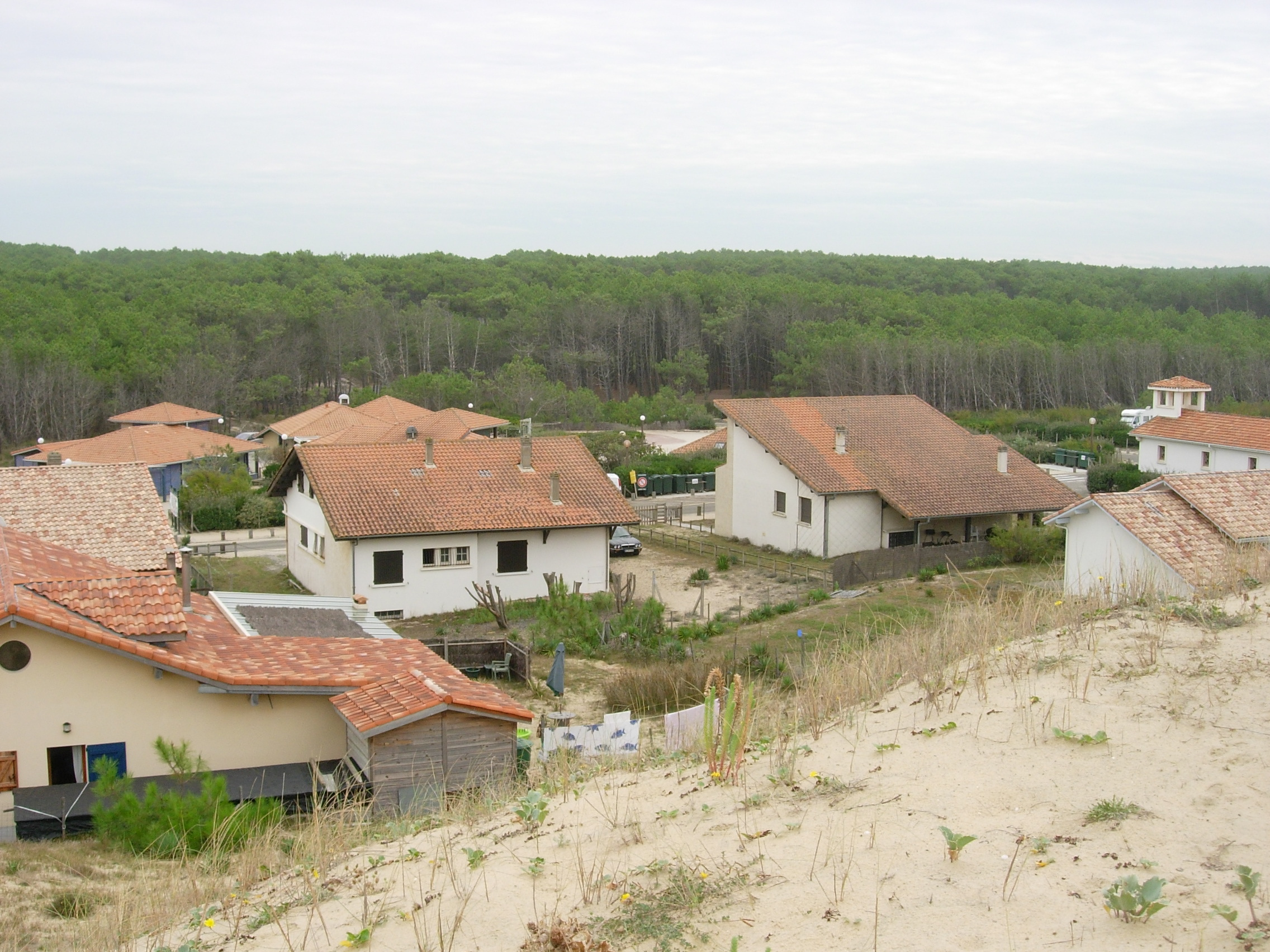 Blick von der Düne über Cap de l'Homy (Lit-et-Mixe)